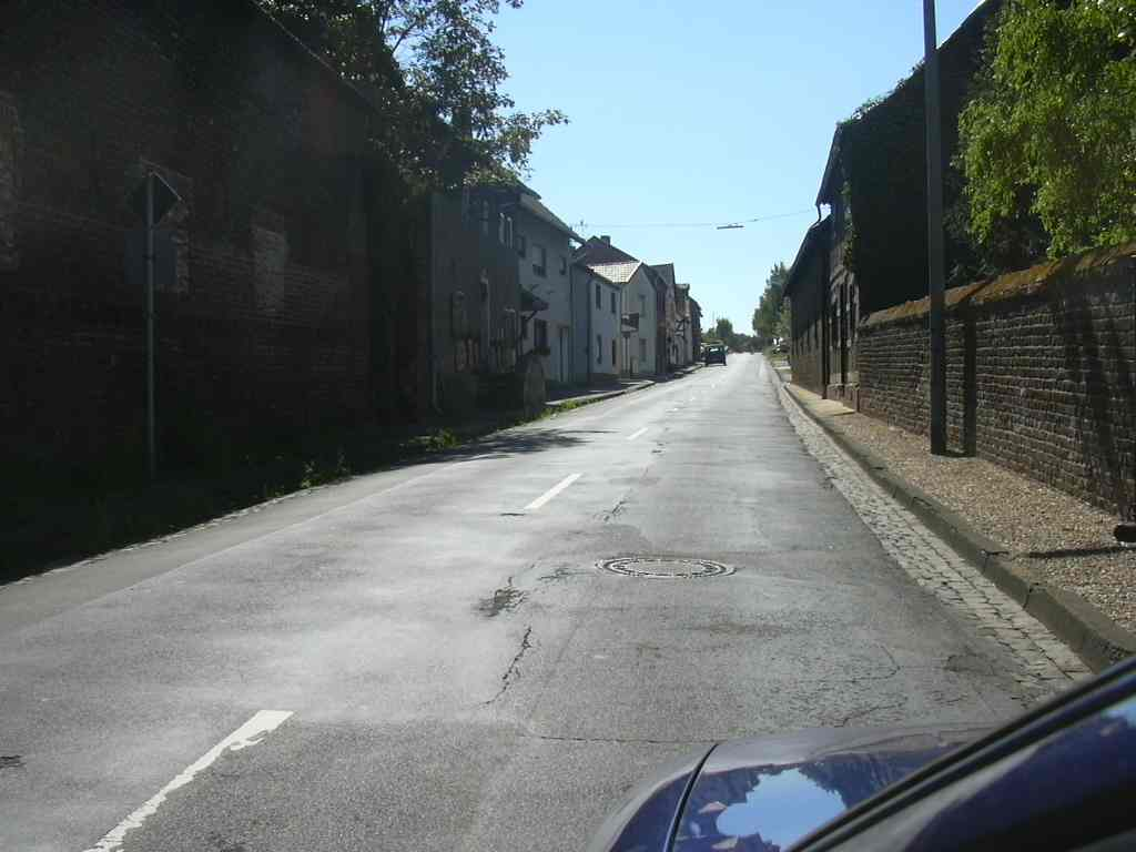 Wichterich